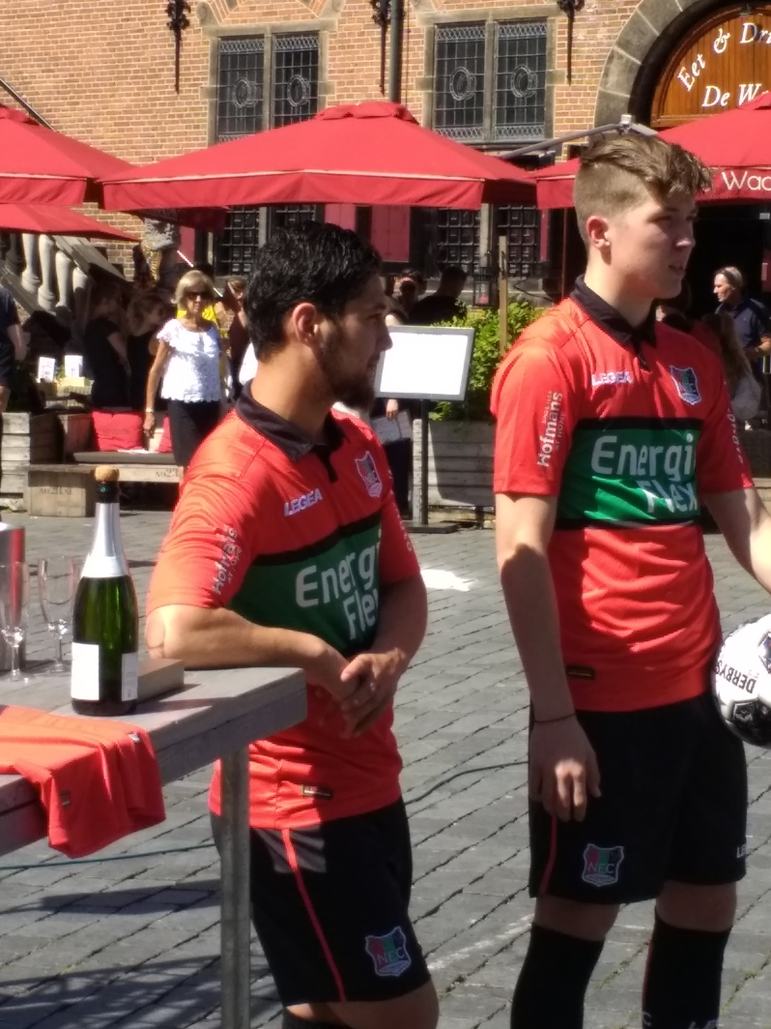 NEC spelers Anass Achahbar en Ole Romeny op de Grote Markt in Nijmegen bij de presentatie van shirtsponsor EnergieFlex en huurling Achahbar.